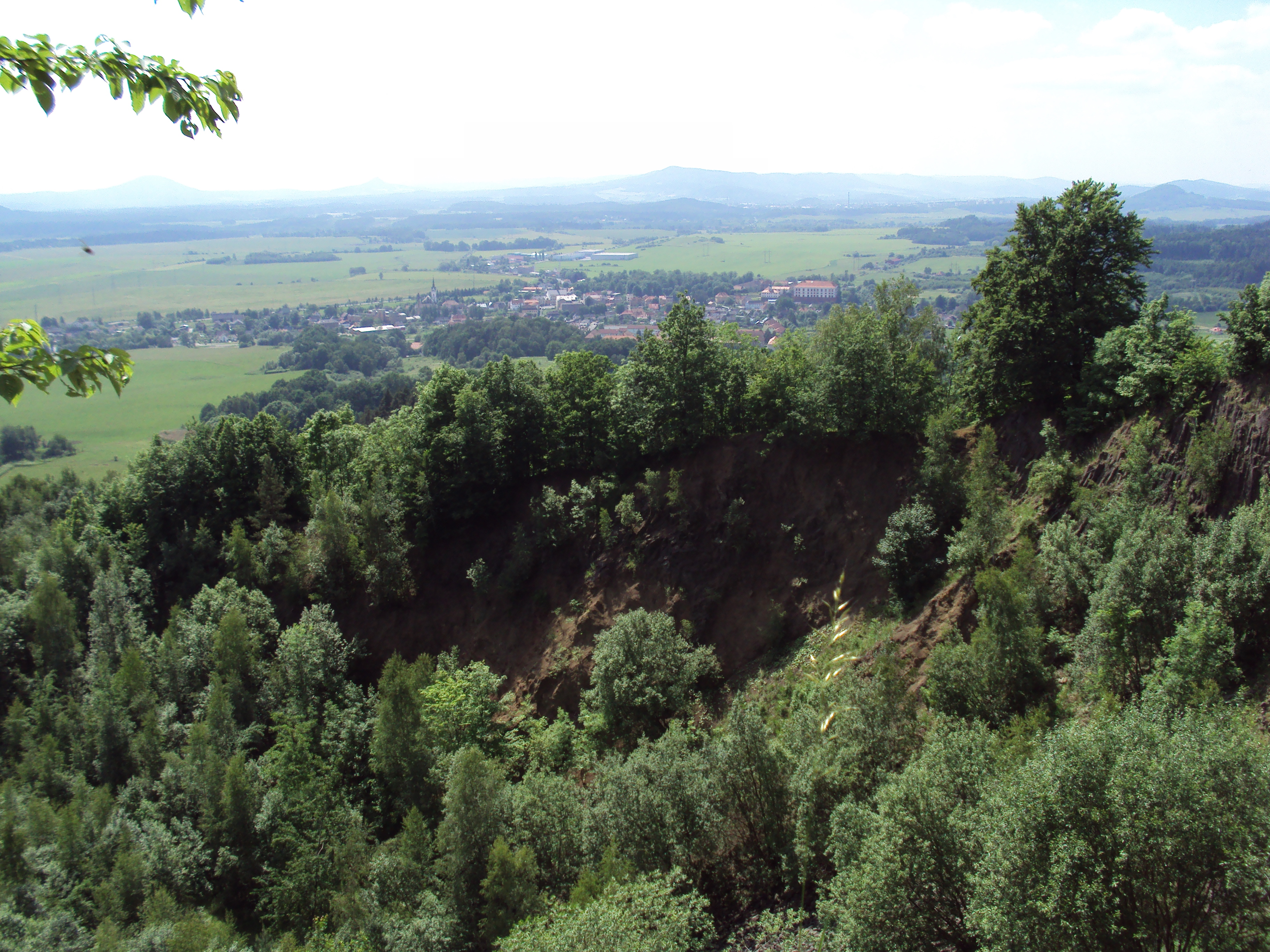 Česky: Zákupy z Kamenického kopce, dole jsou zbytky lomu